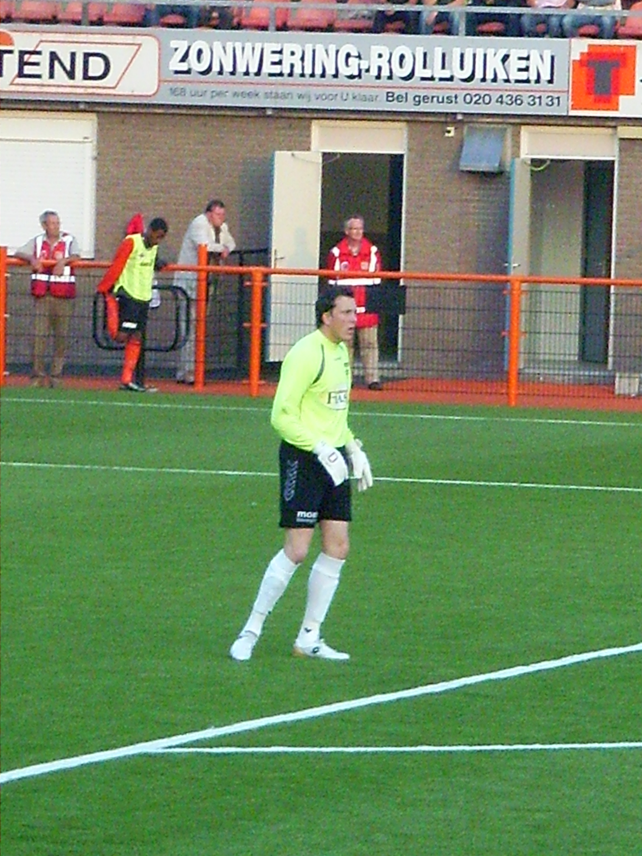 Diederik Boer